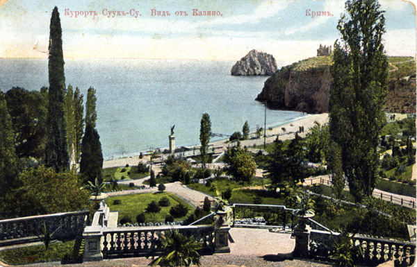 Крымский курорт Суук-Су, вид на море.